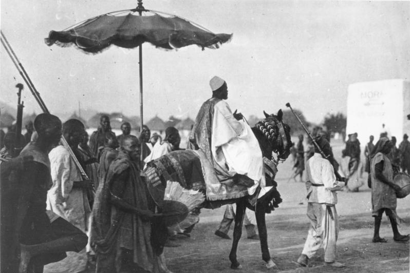 Afrika. Kamerun. Mora. Der Sultan Bukar mit seinem Gefolge.